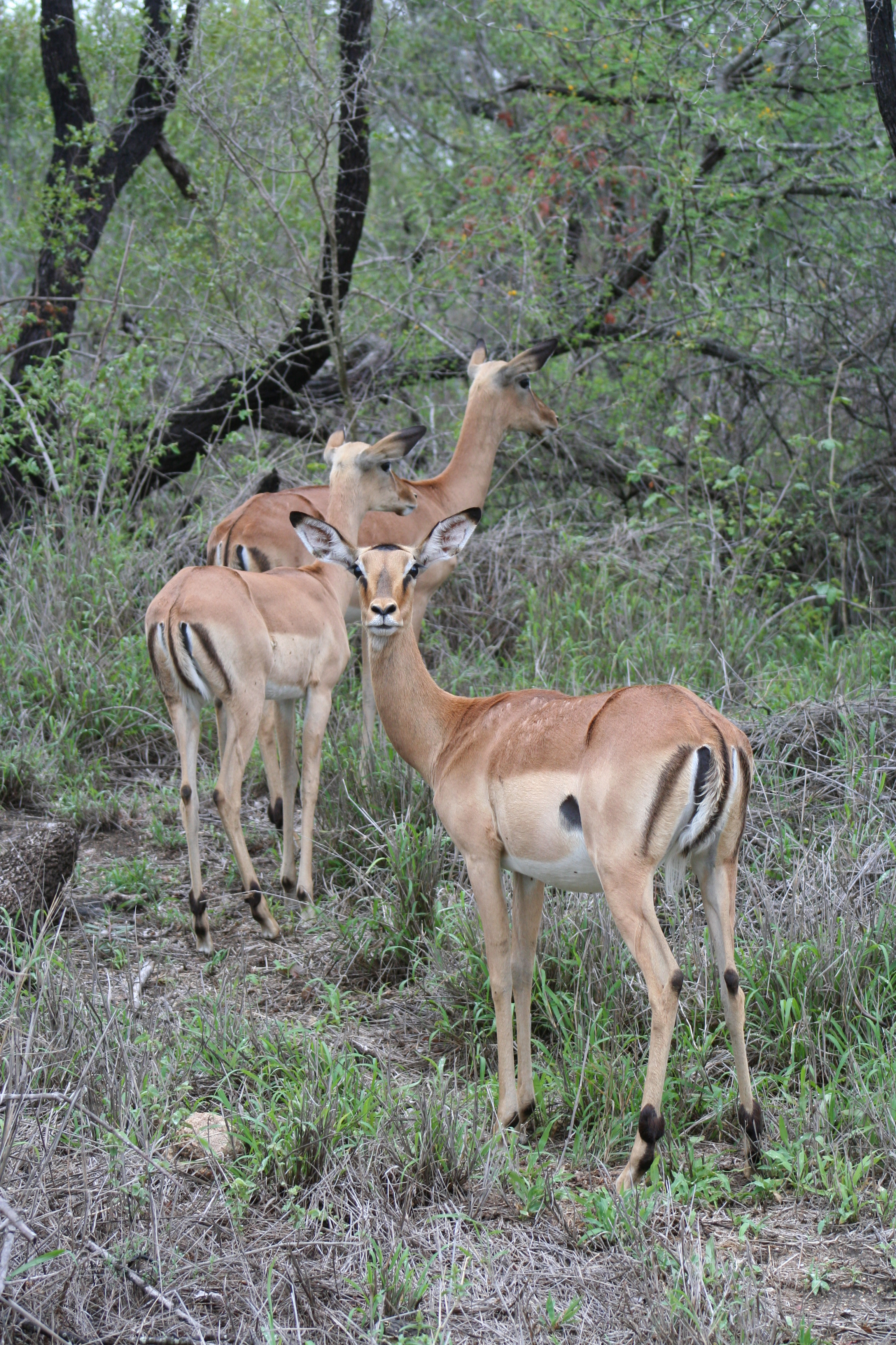 Impala